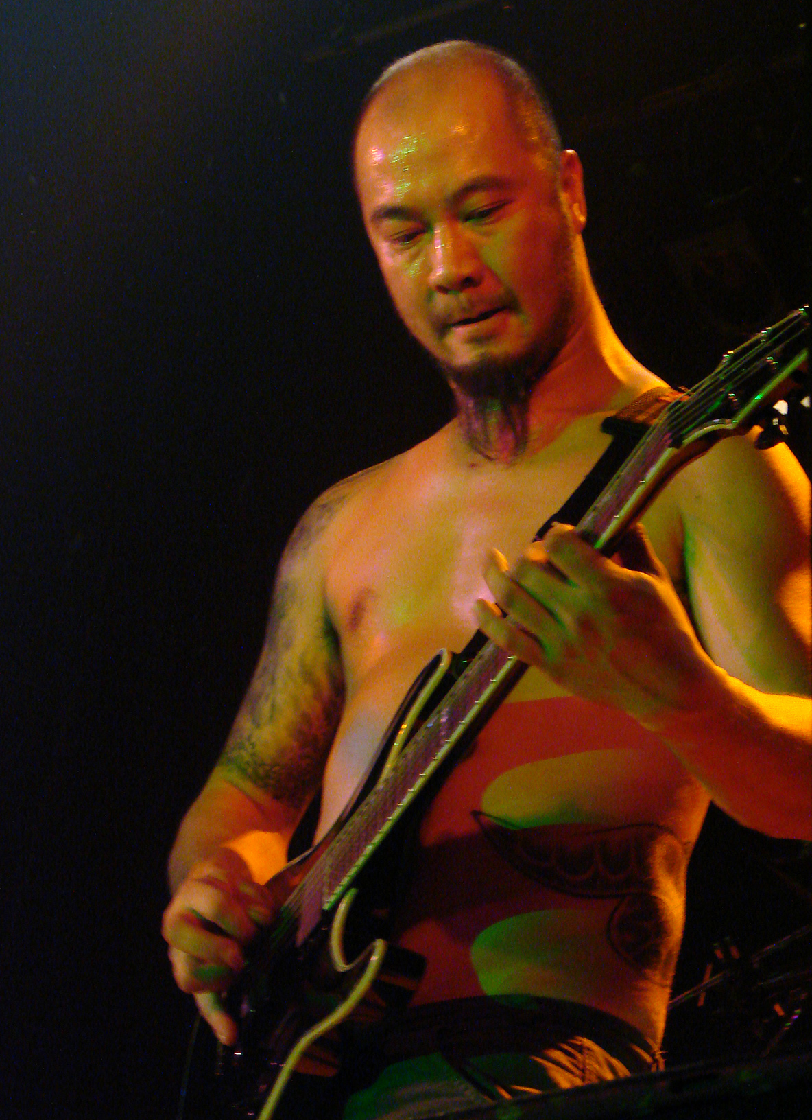 Benighted au Coolness'tival 2007, le 3/11/07 à Montdidier (60). Liem à la guitare.